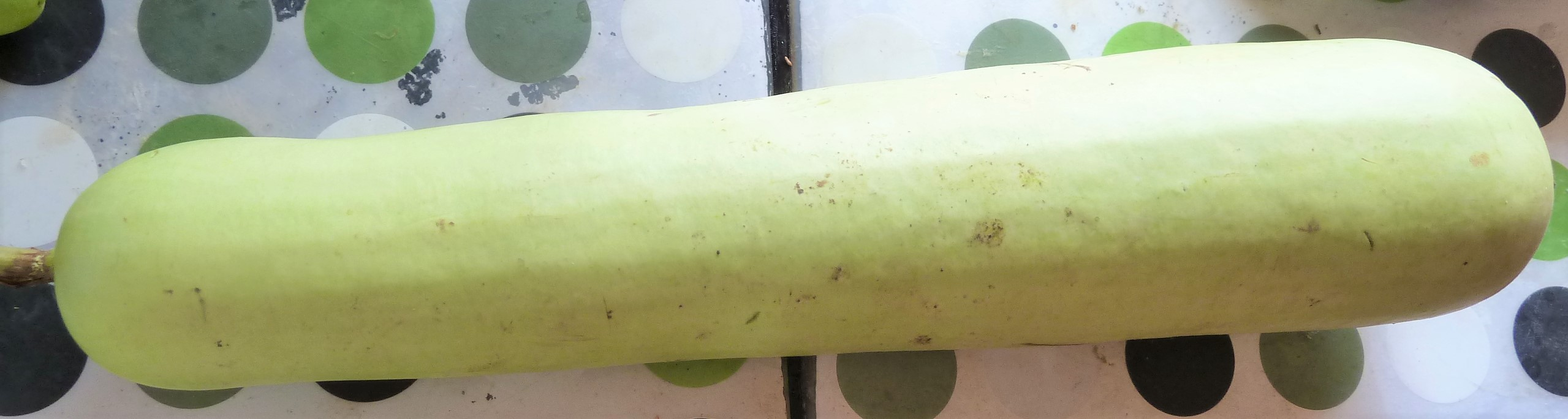 సొరకాయ